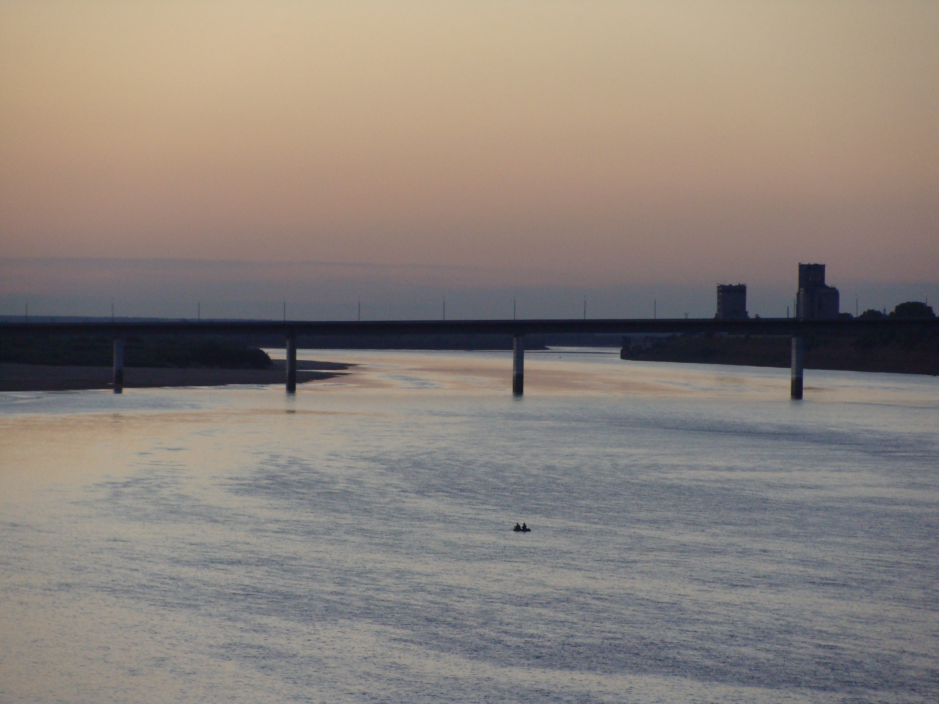 Севрная Двина у Котласа. Вид из окна поезда, идущего по мосту